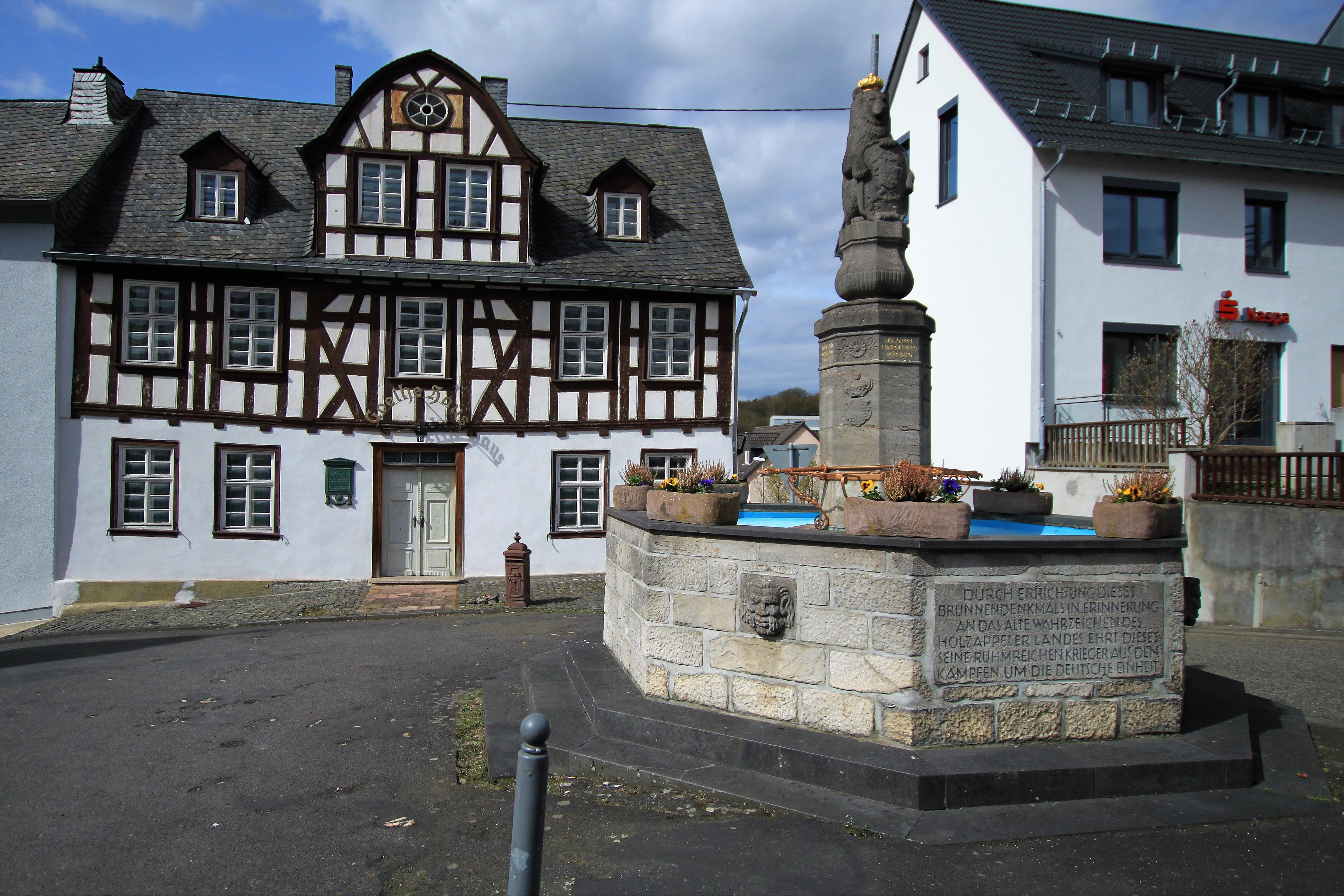 Holzappel, Bärenbrunnen am unteren Marktplatz, vor Hauptstrasse 19